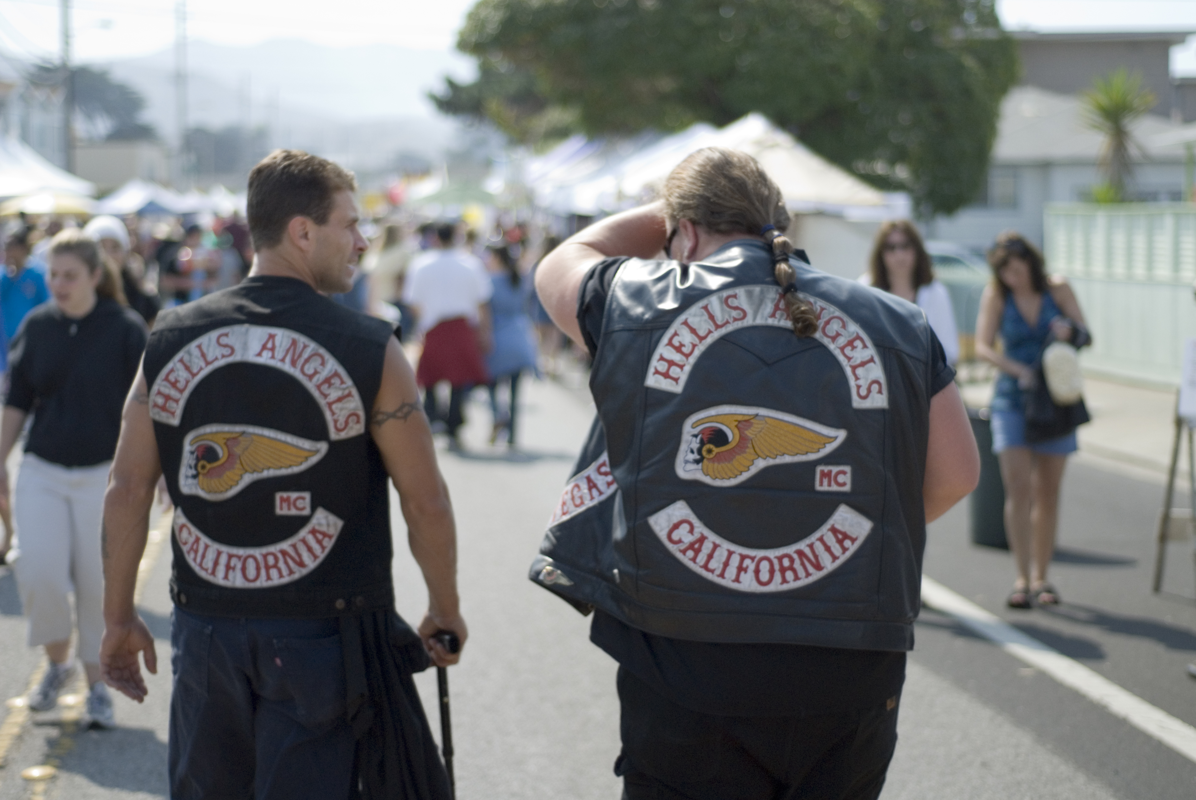 Mitglieder der Hells Angels, die dem Charter California (Kalifornien, USA) angehören.